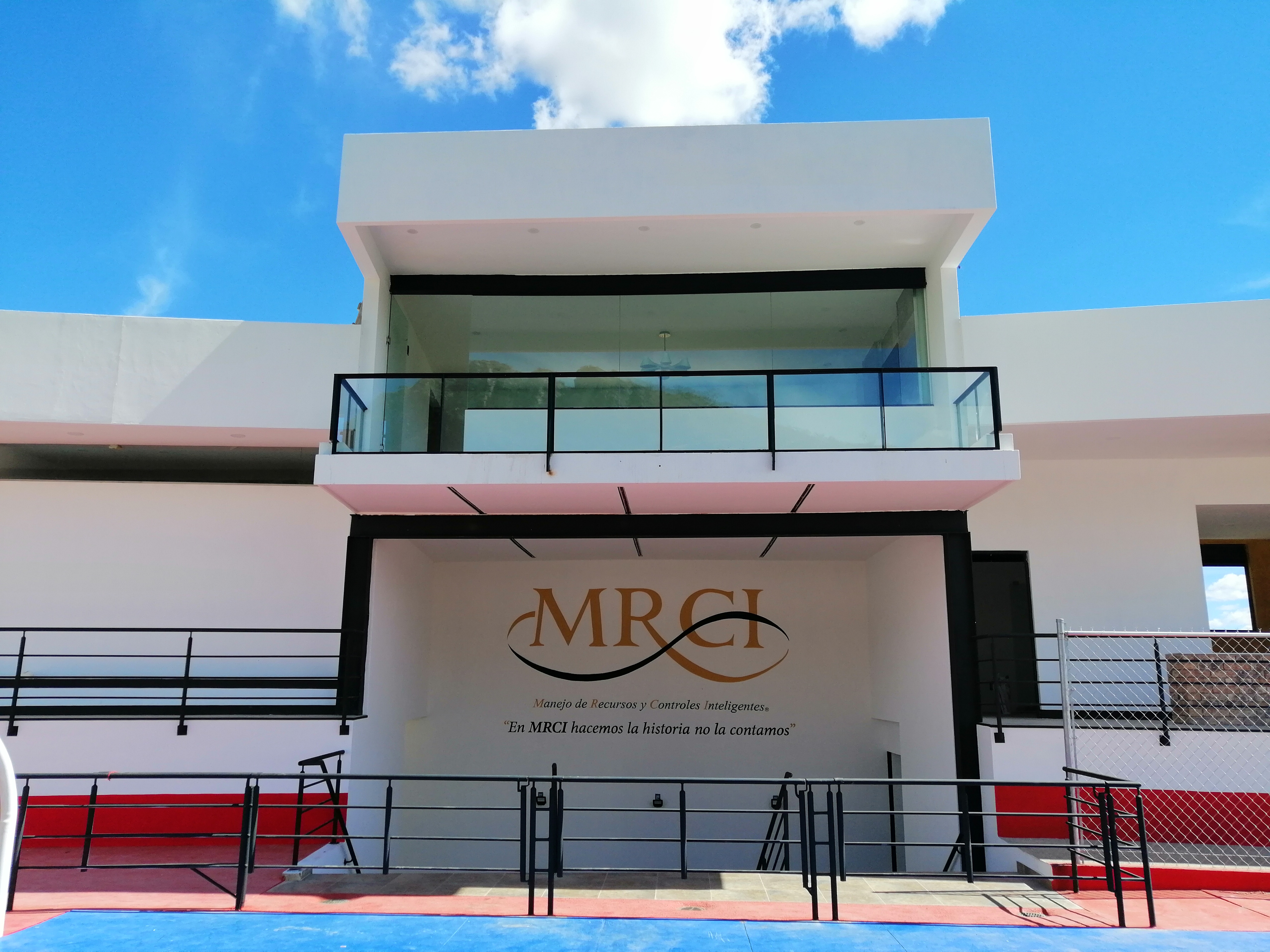 Palco Estadio Independiente MRCI